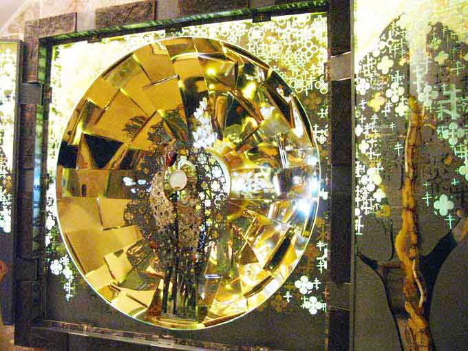 Tryptyk Jerozolimski w kaplicy IV stacji Drogi Krzyżowej (Via Dolorosa) w Jerozolimie, autor: Mariusz Drapikowski.